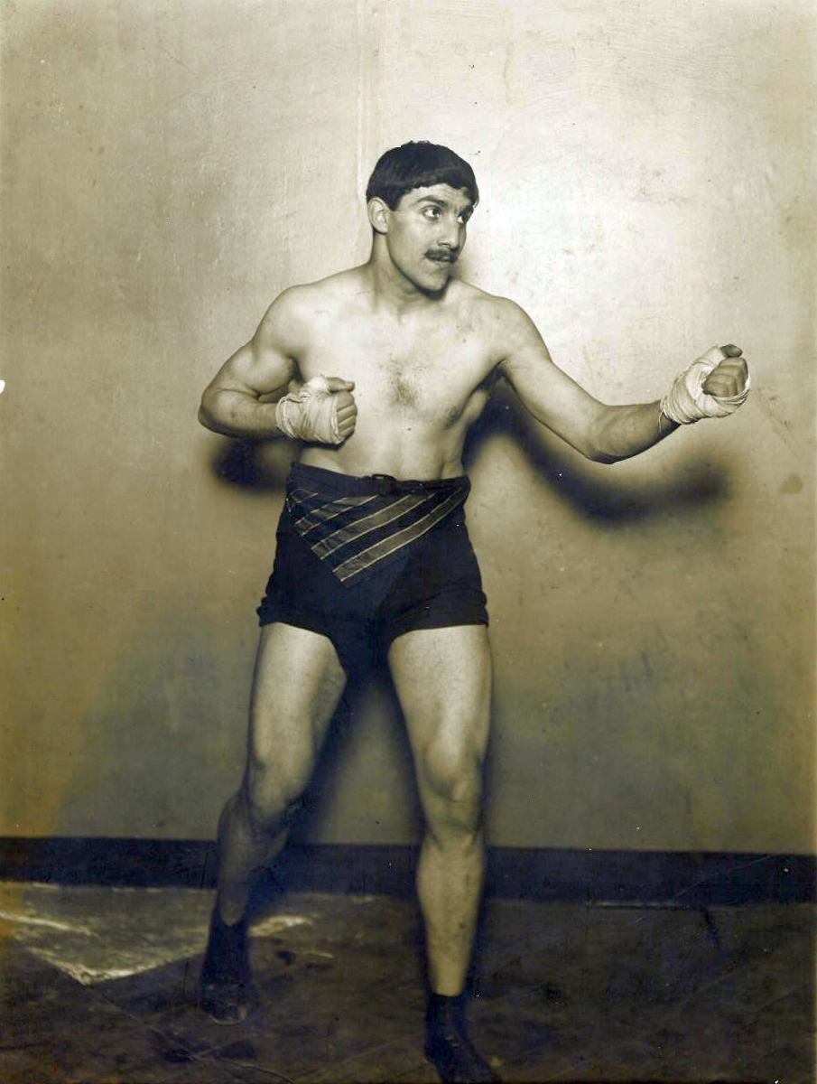 Raoul Paoli, champion de France catégorie poids lourds, en 1908, 1909, 1910, 1911 et 1912